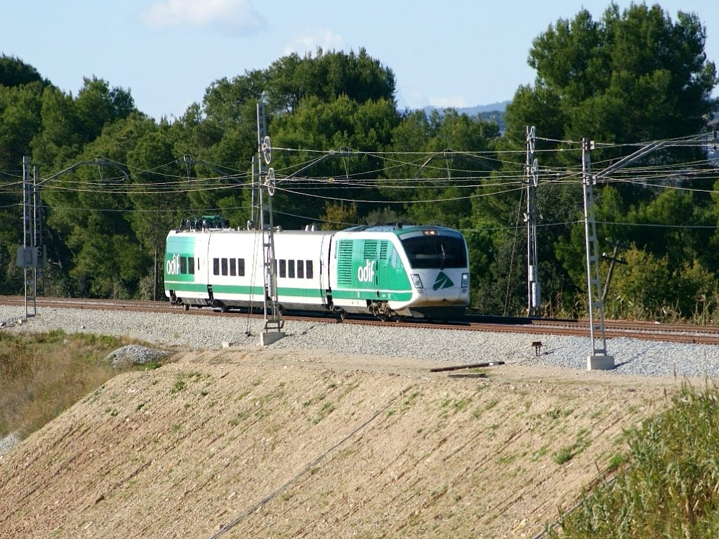 La BT de Adif pasando por Lavern (Línea Barcelona-Martorell-Villafranca-Tarragona).